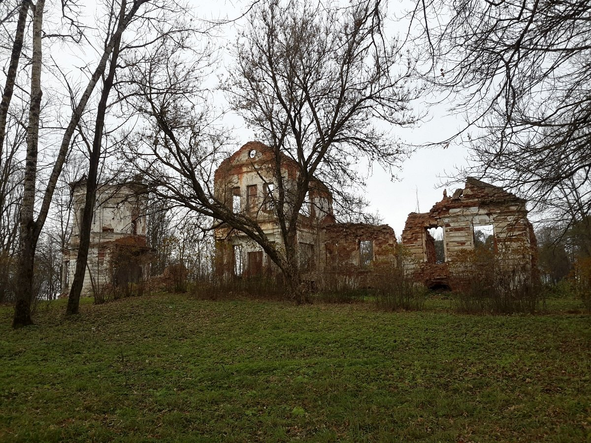 Полымя. Сядзіба Свяцкіх "Старая Беліца". Сядзібны дом